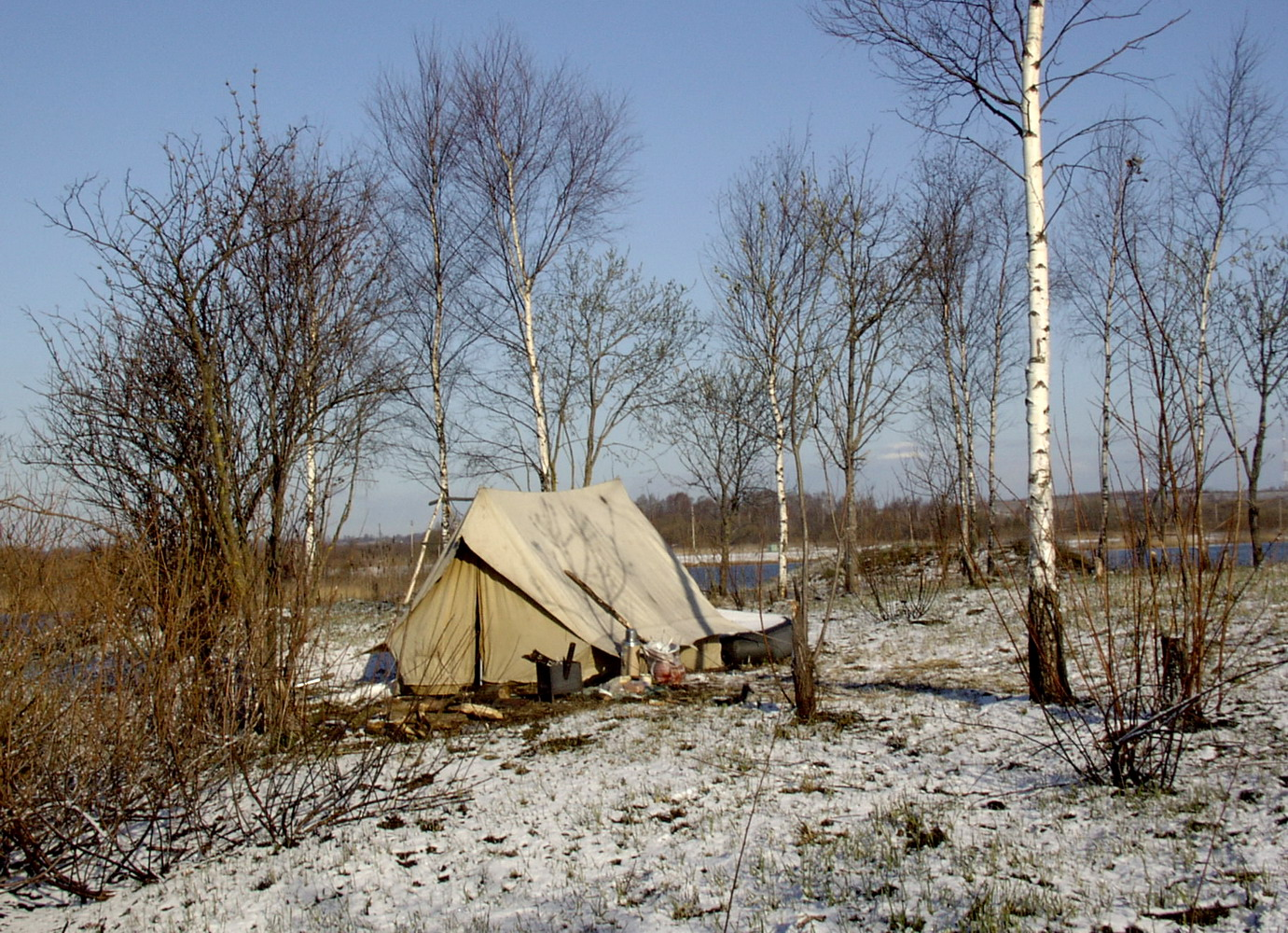 А за ночь выпал снег... (2)